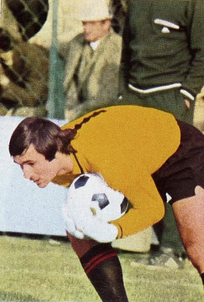 Dominique Baratelli en 1972 (OGC Nice), 'Ageducatifs Football 1972 - 1973', Panini figurina n°132.